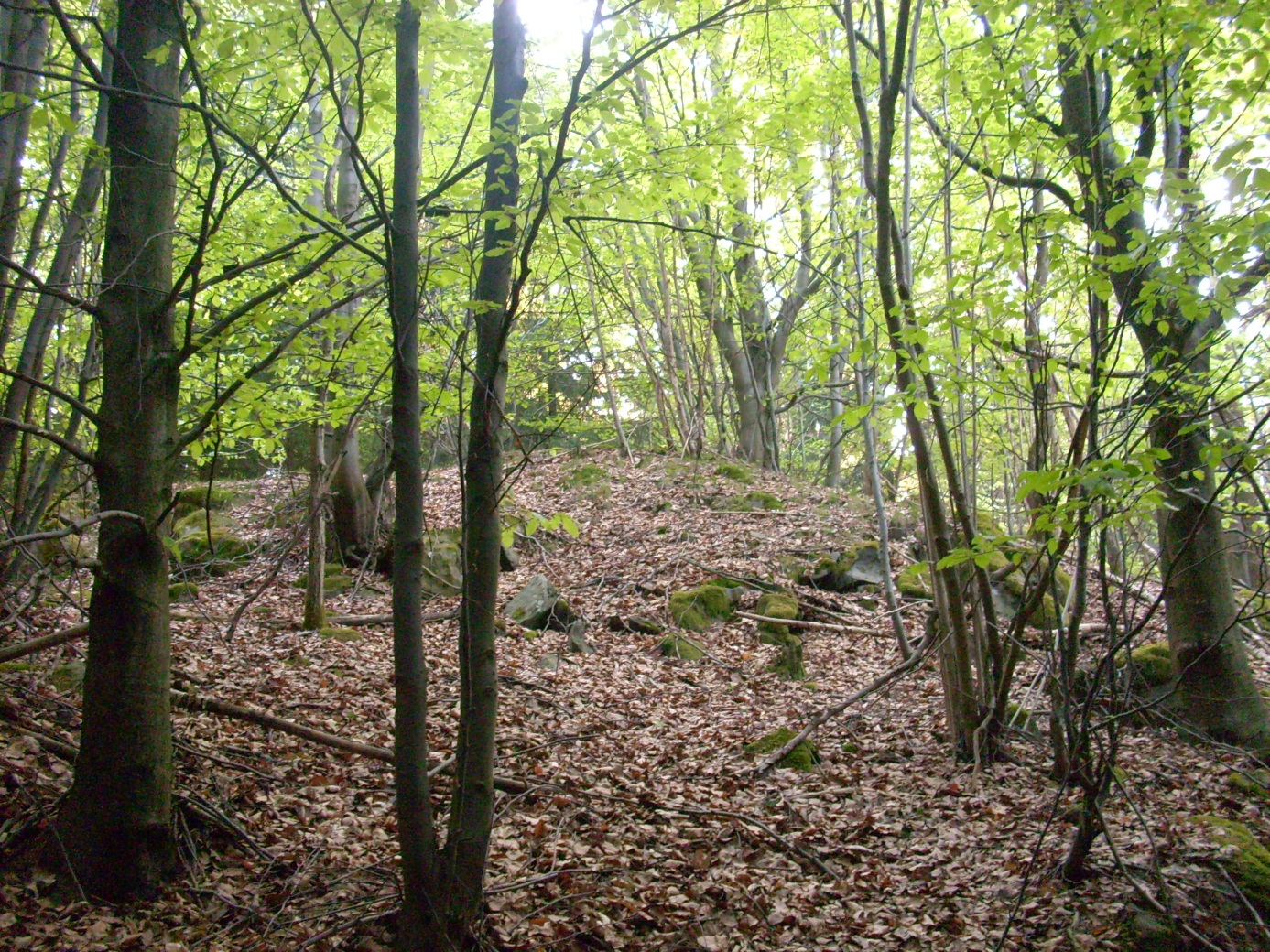 Der Kernhügel aus nördlicher Richtung, 2011.